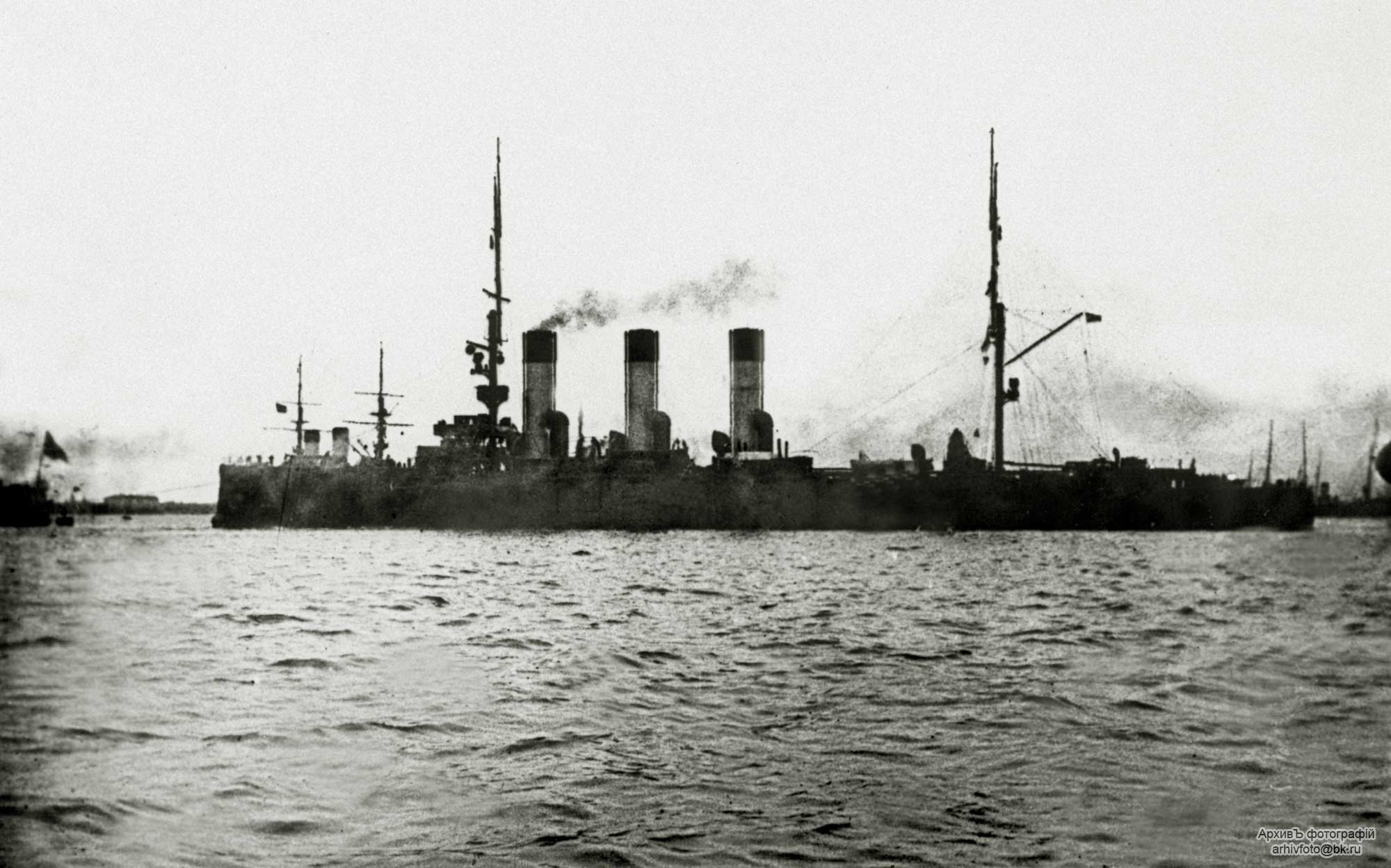 Бронепалубный крейсер I-го ранга "Аврора" в составе Второй Эскадры Тихого океана